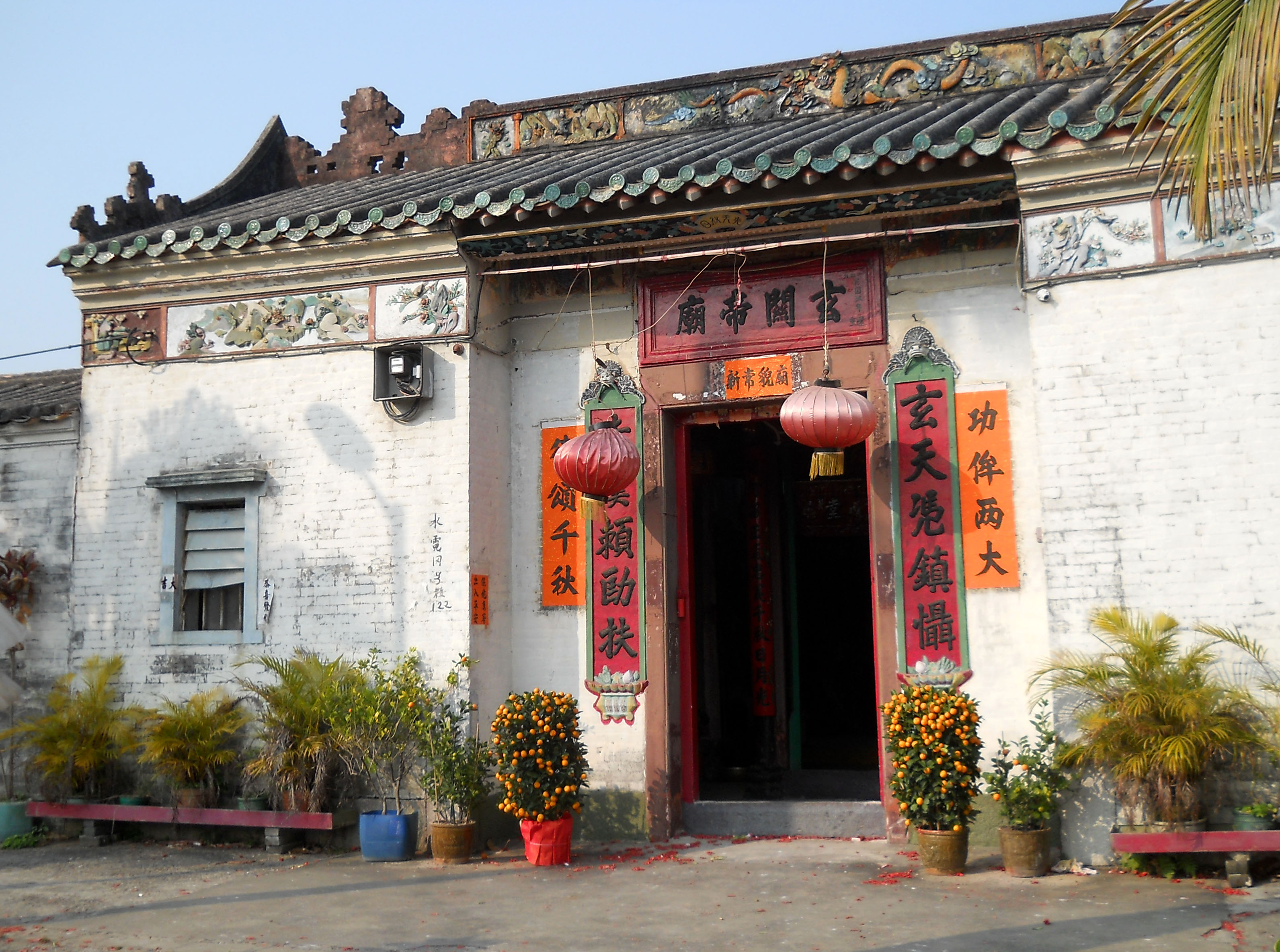 中文（香港）: 輞井圍玄關帝廟